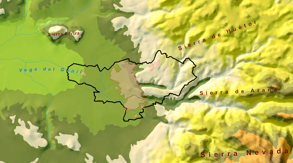 Relieve del Término Municipal de Granada (España)